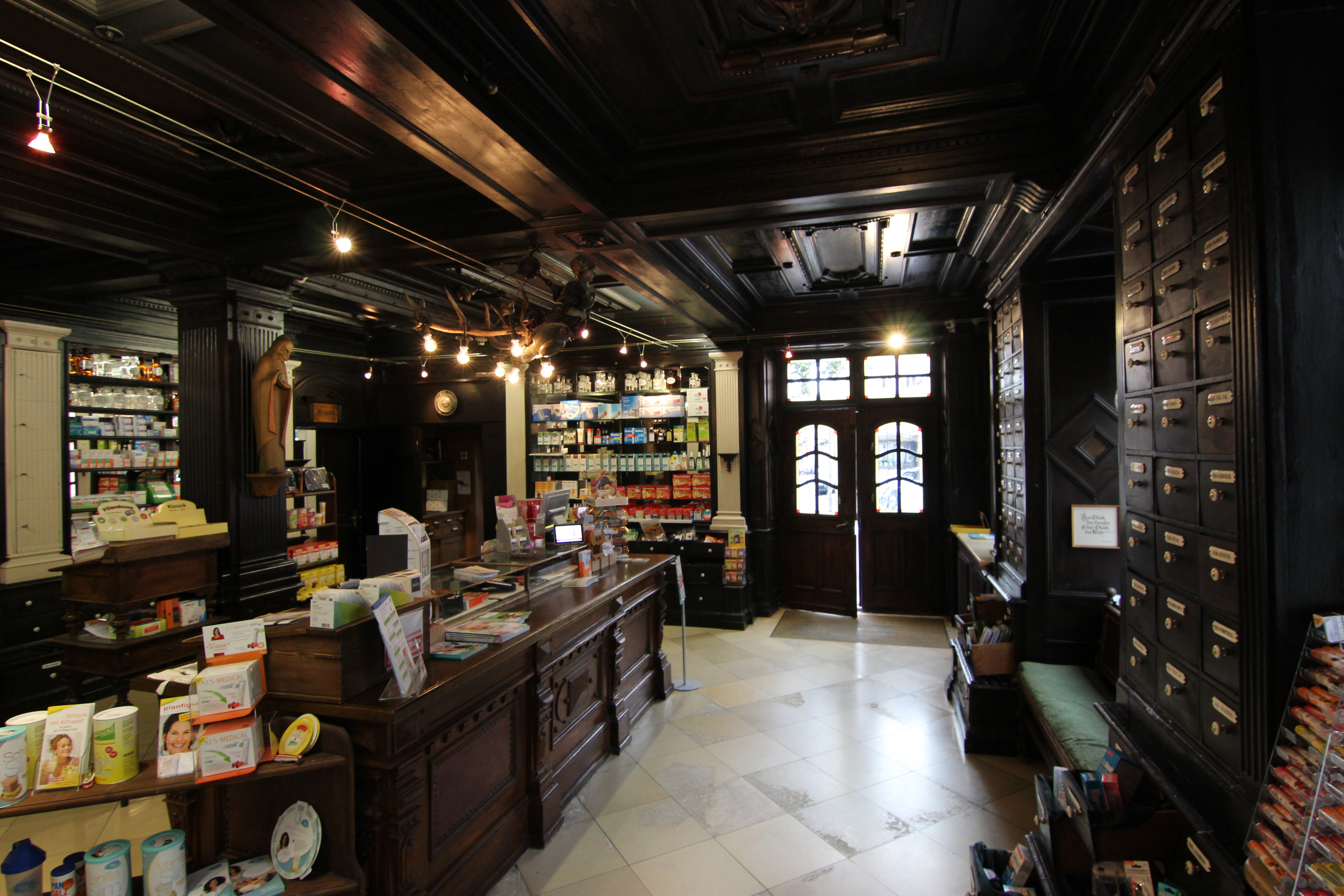 Historische Apothekenausstattung, Hofapotheke, Kempten